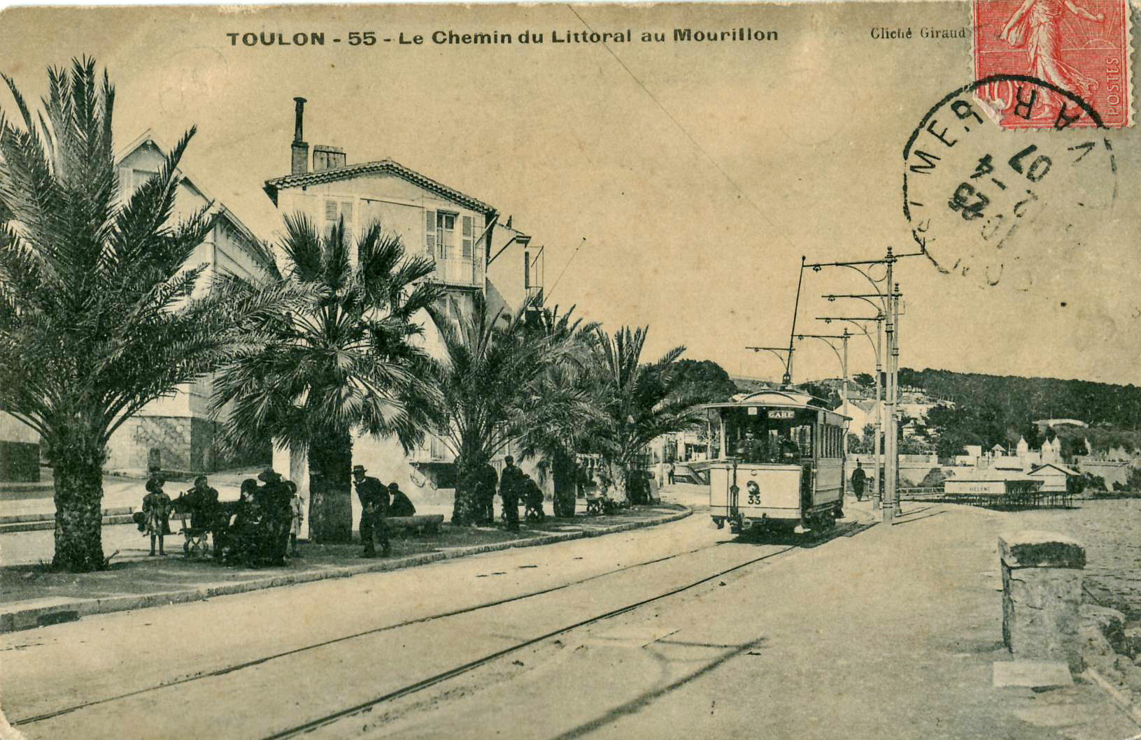 Carte postale ancienne éditée par Giraud, n°55 : TOULON - Le Chemin du Littoral au Mourillon